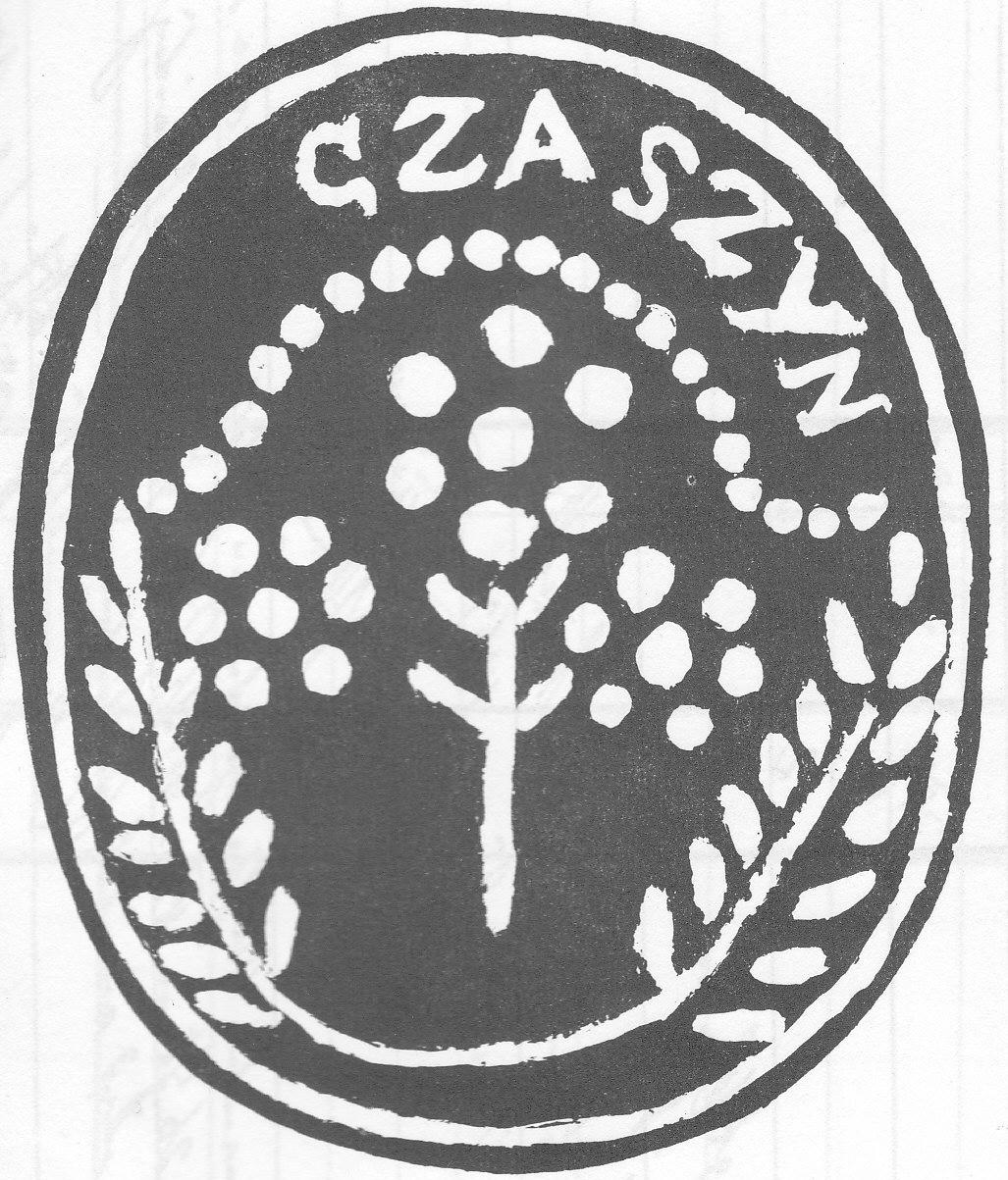 Herb wsi Czaszyn używany w XIX wieku